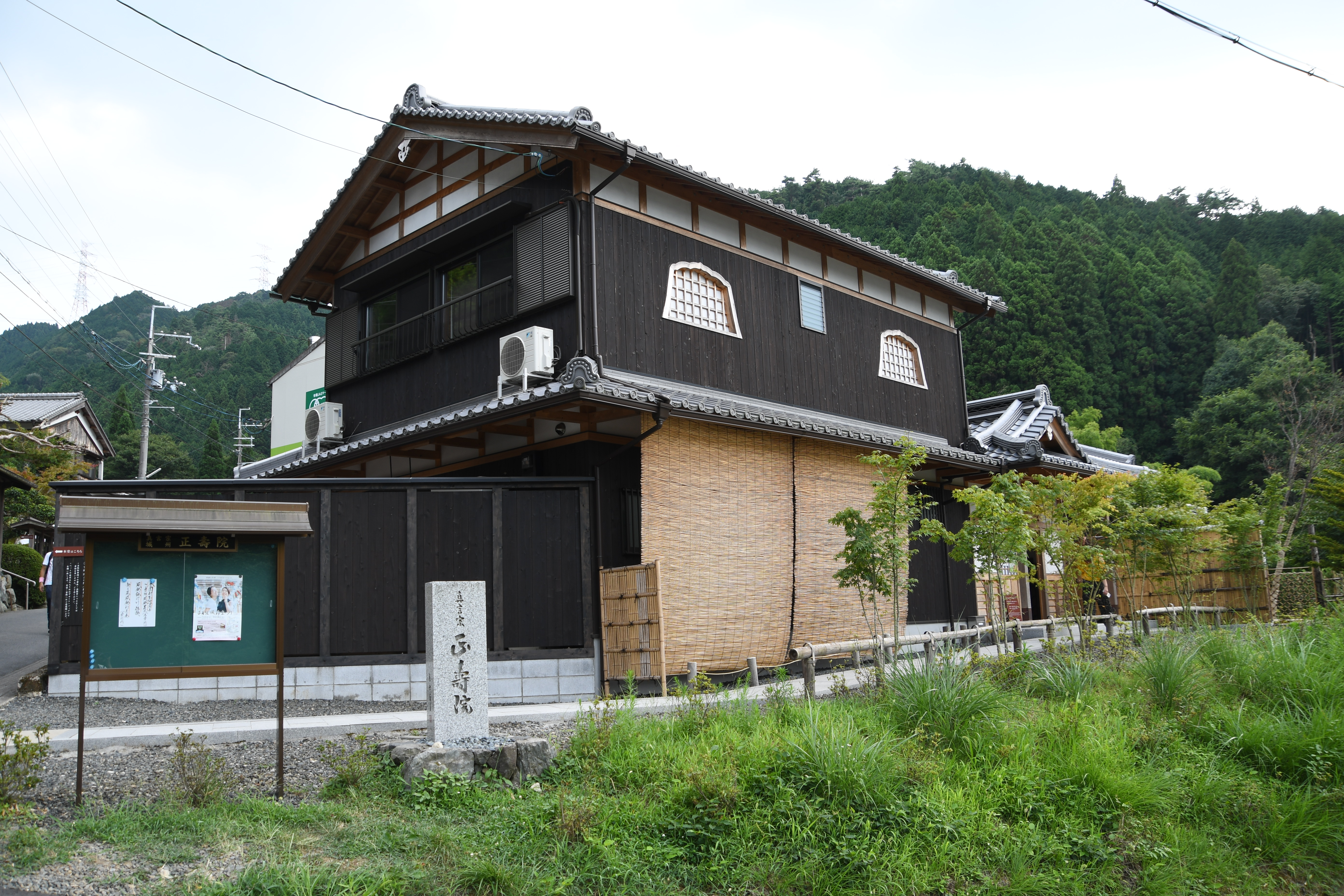 京都府宇治田原町奥山田 正寿院 客殿（則天の間）。2018年8月11日撮影。